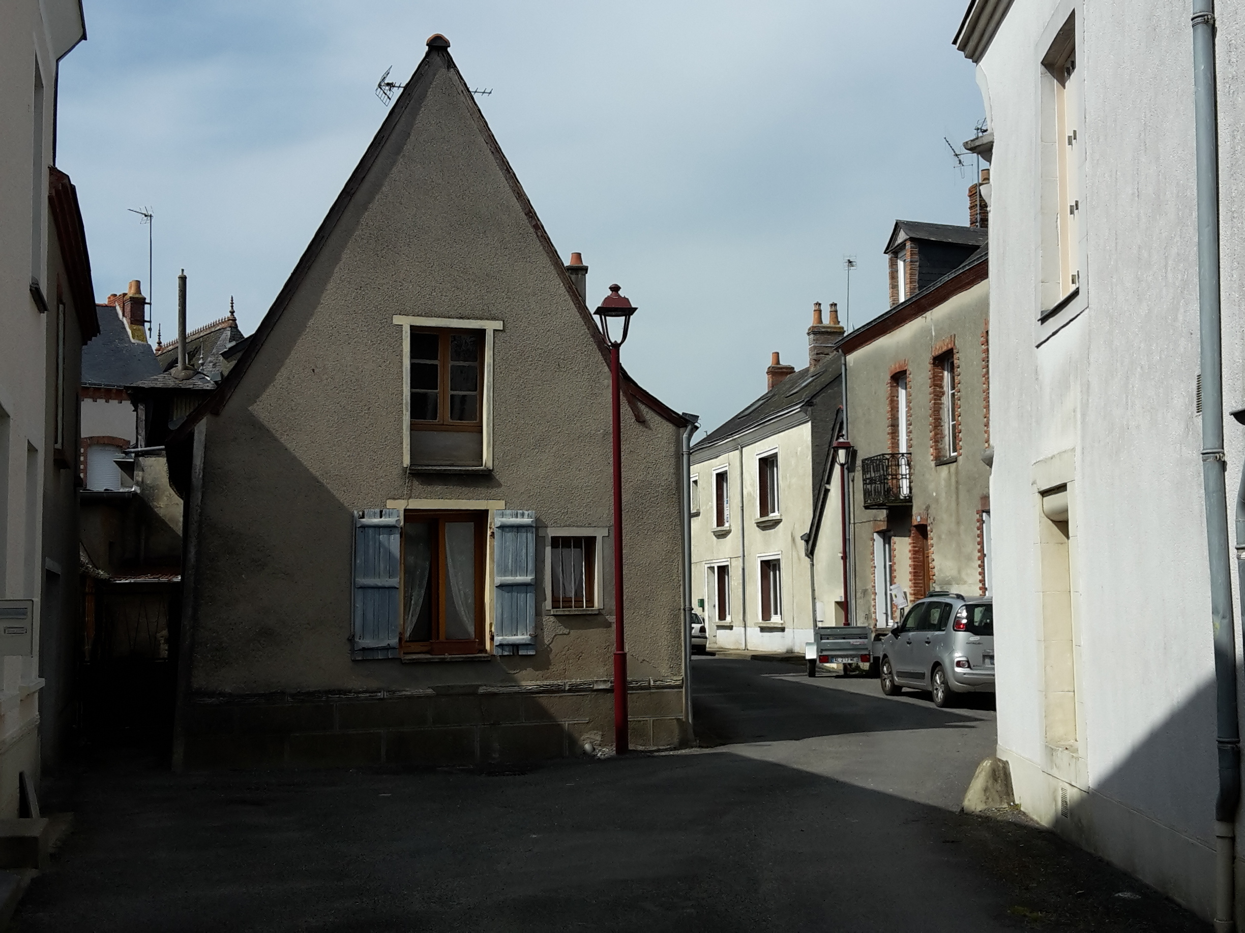 Loiré, Maine-et-Loire, France.